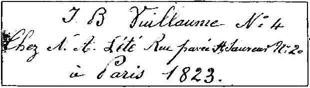 Étiquette Jean-Baptiste Vuillaume — 1823